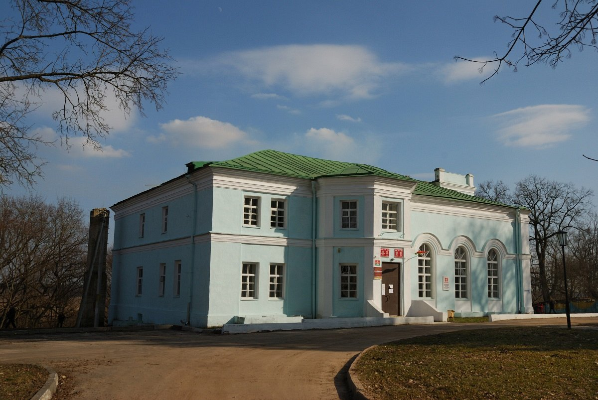 Дашкаўка. Сядзіба